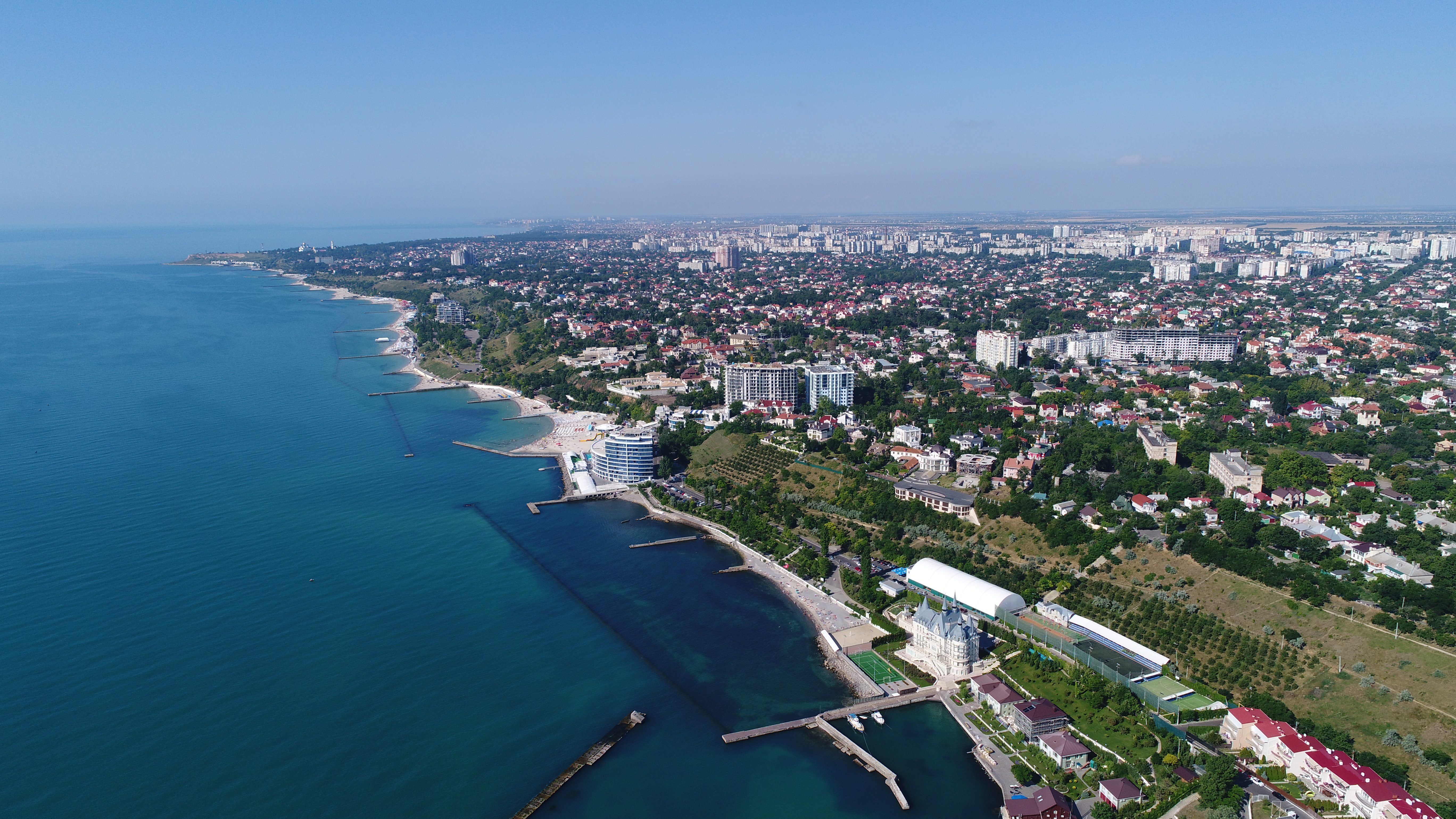 Мыс Большой Фонтан, Одесса.